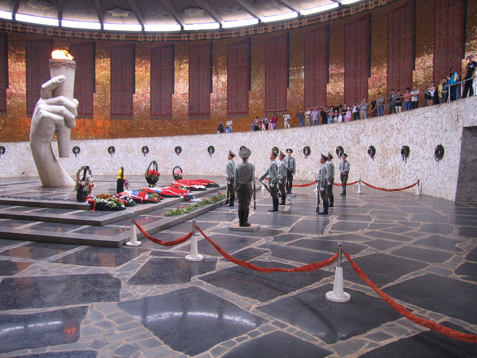 The Eternal Flame in Vechnii Ogon, Mamayev Kurgan.